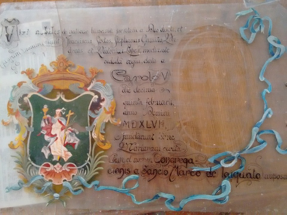 Cristal conmemorativo de la fundación de Irapuato, pintado a mano, escrito en latín